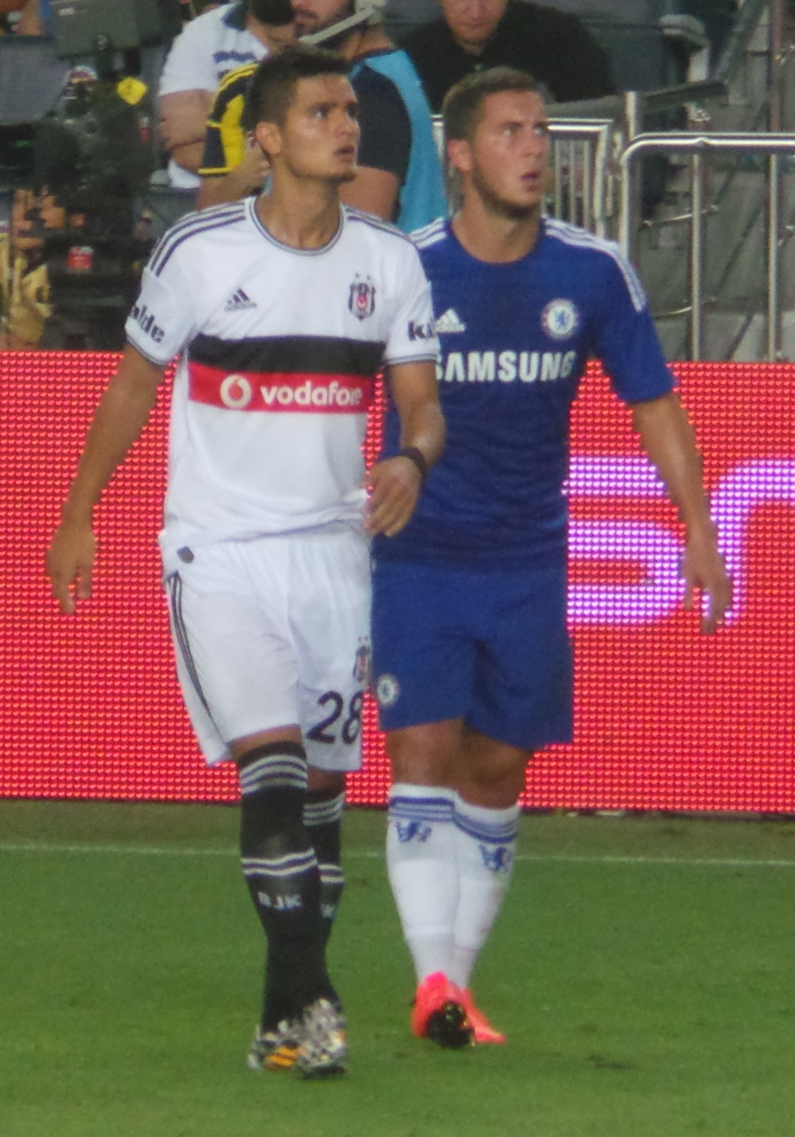 Ümit Karaal ve Eden Hazar SOMA turnuvasında